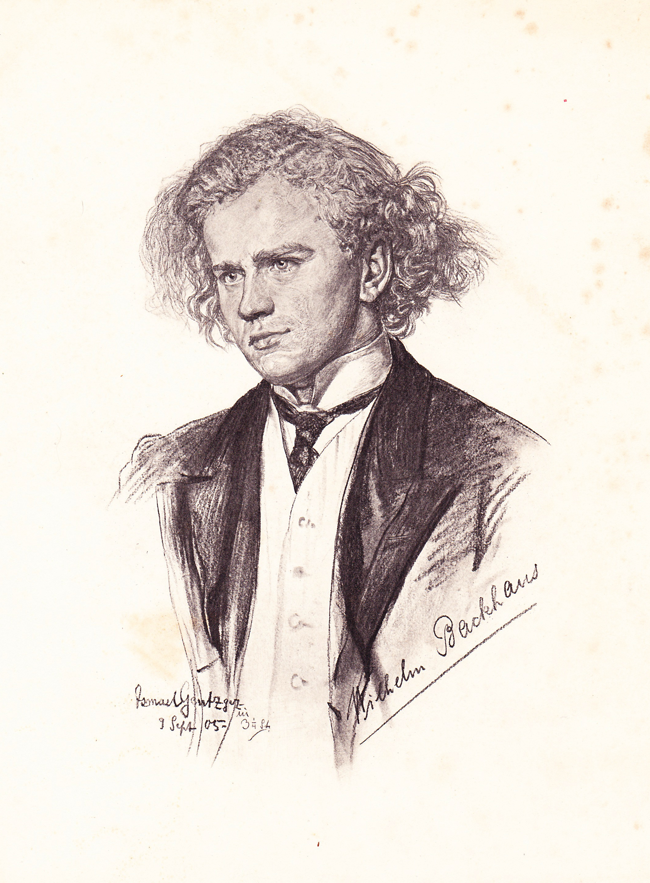 Wilhelm Backhaus gezeichnet von Ismael Gentz 1905 (gezeichnet in 3 1/4 Stunden). Privatsammlung